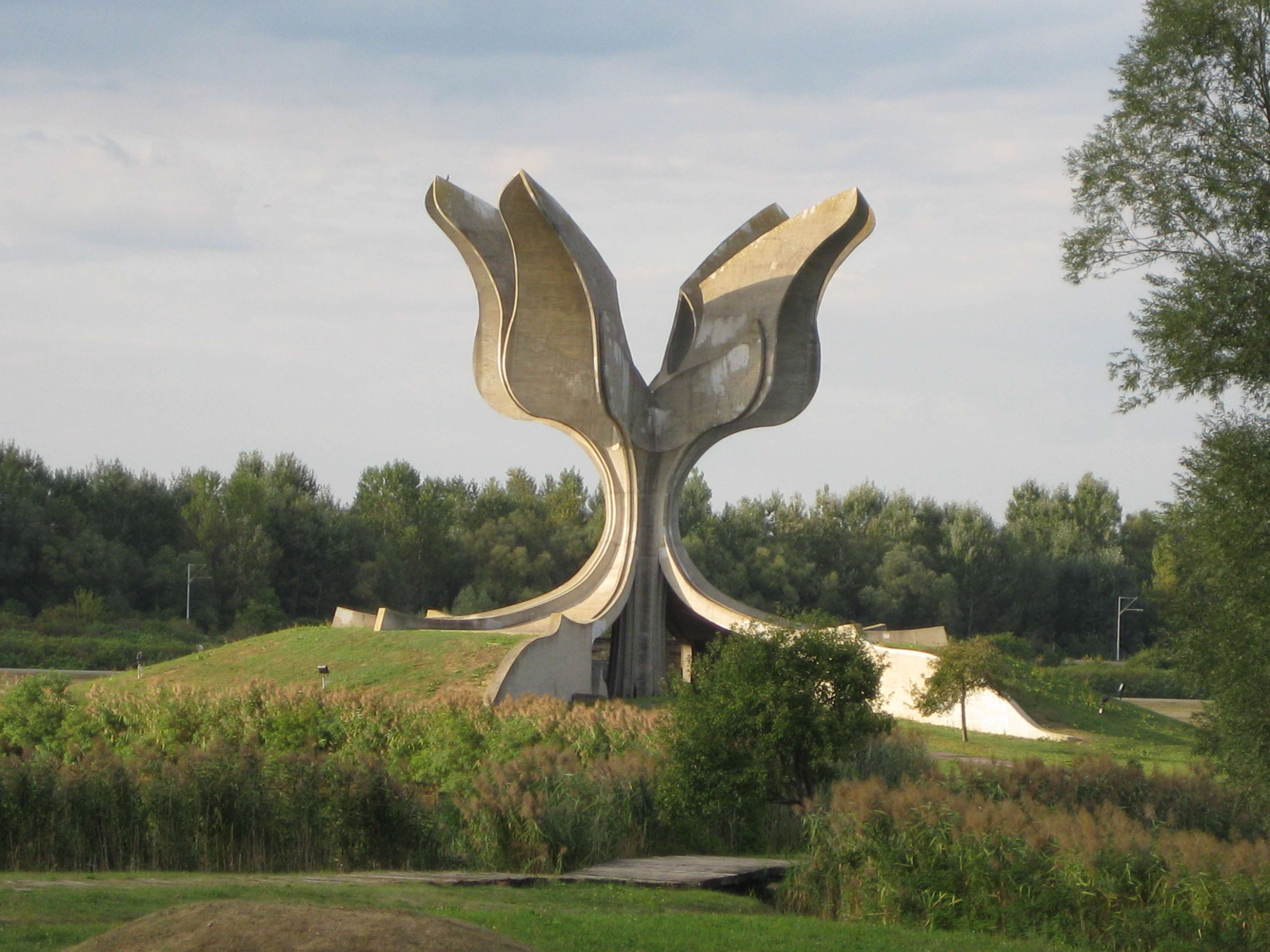 spomenik u spomen parku JasenovacSlovenščina: spomenik v spominskem parku Jasenovac